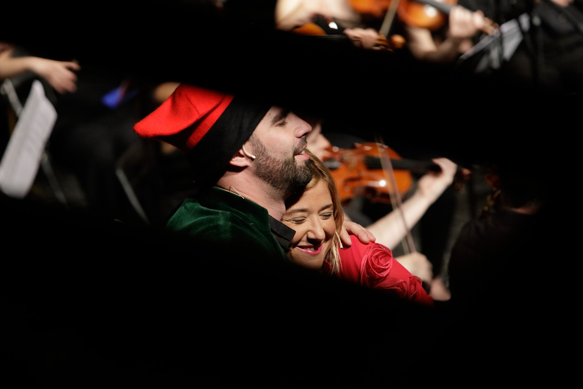 Moment de la Sarsuela L'Aplec del Remei.